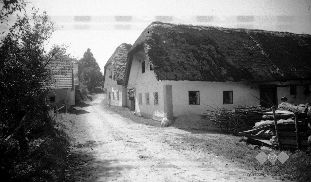 Velike Lipljene kot obcestna (dvovrstna) vas.